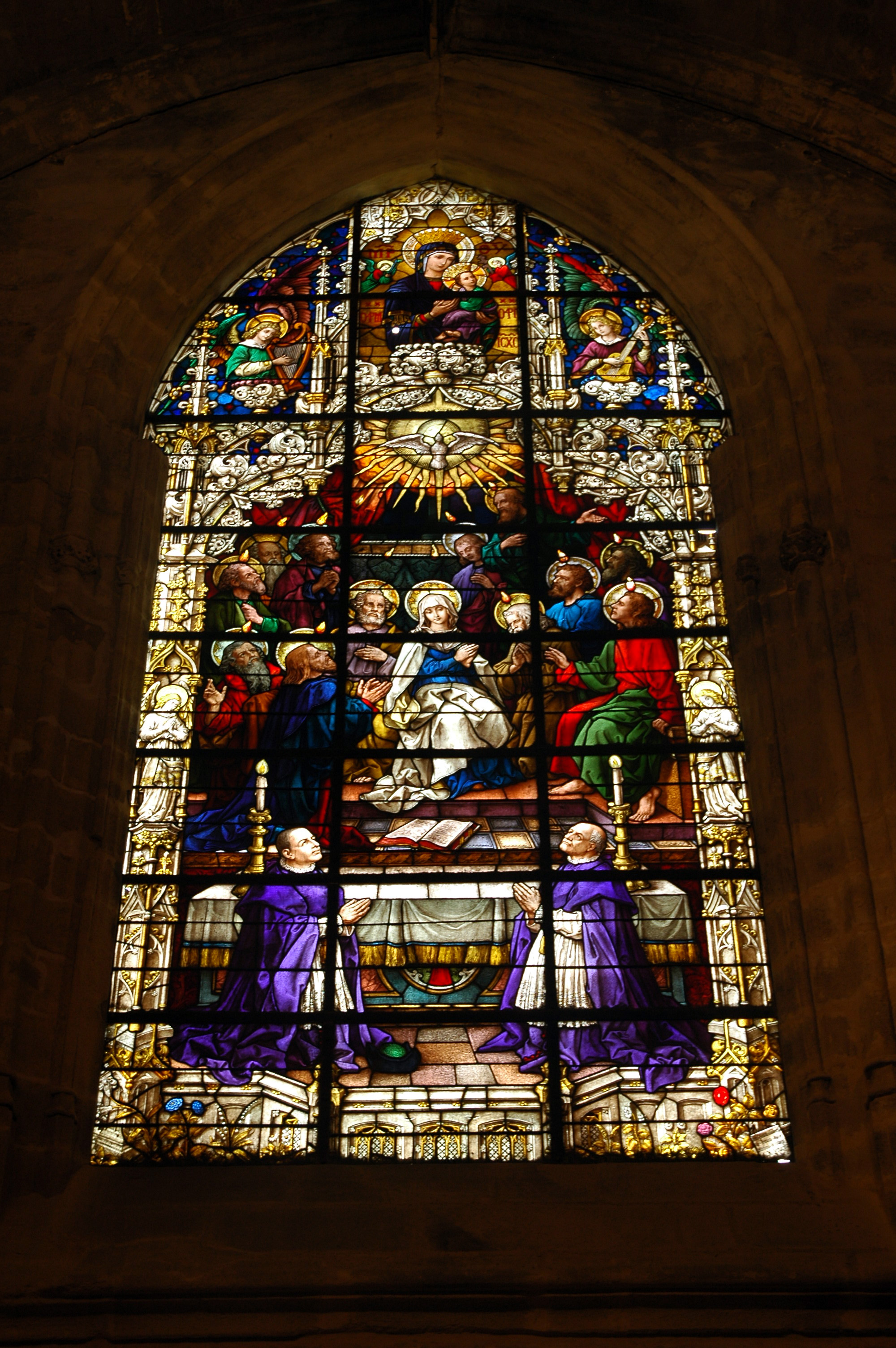 Vidrieras - Interior de la Catedral de Segovia, España.